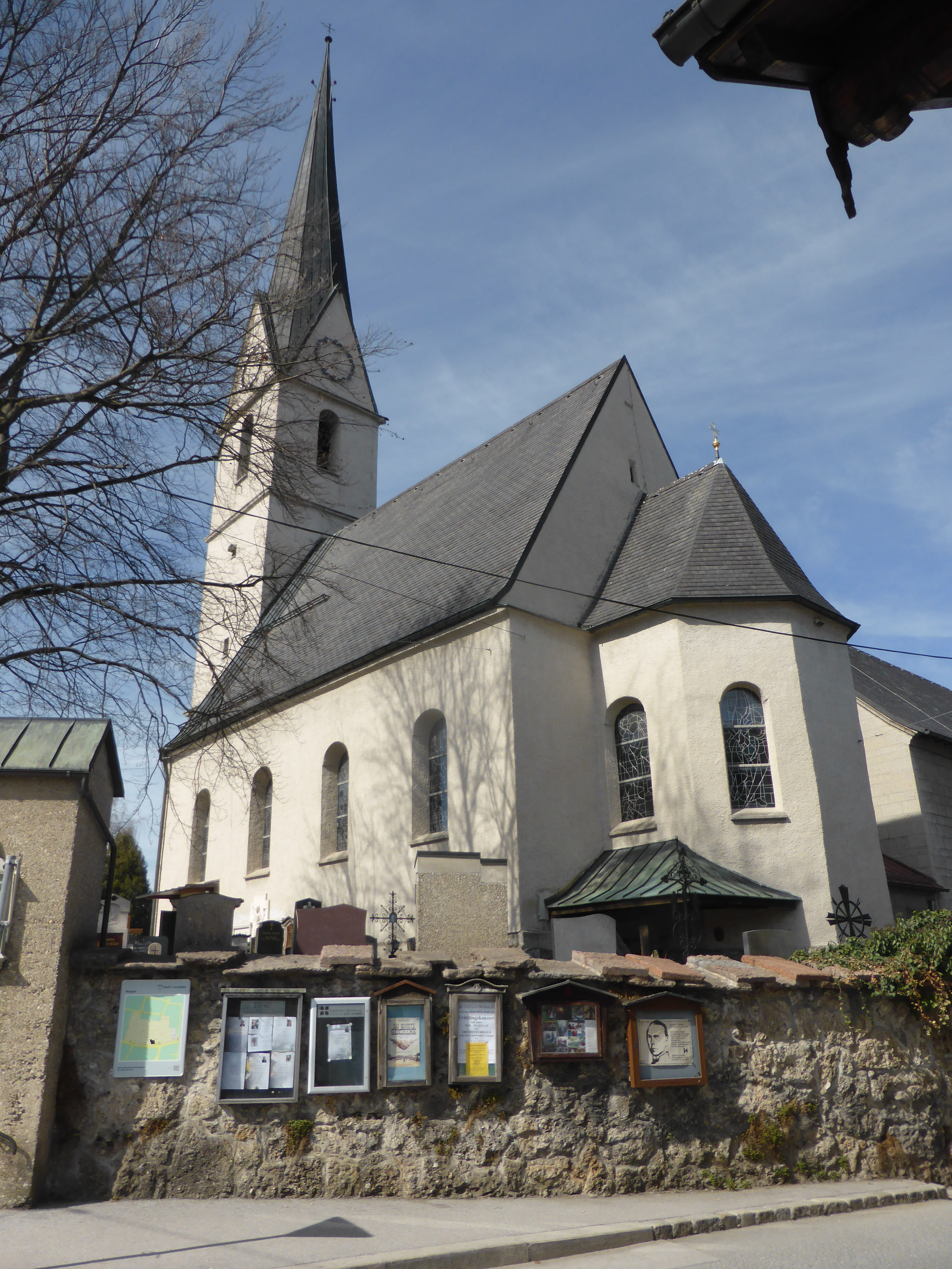 Kath. Pfarrkirche Maxglan, Kirche von außen